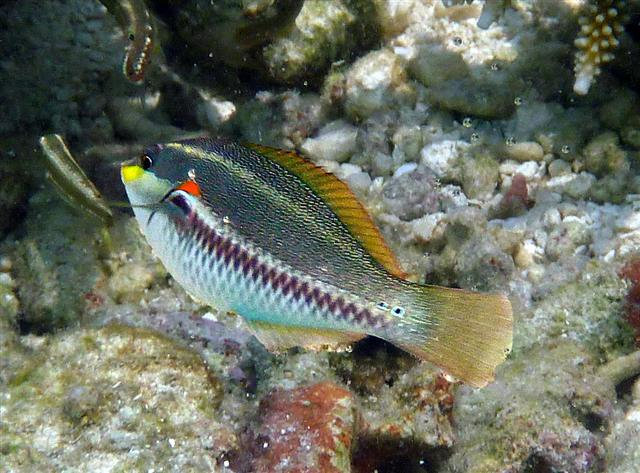 Stethojulis albovittata